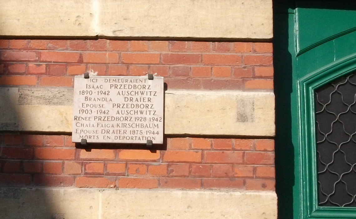 Plaque du souvenir 47 rue Tellier à Reims en hommage à la famille Przedborz qui fut déporté et assassiné à Auschwitz. Le seul rescapé a été caché par Aimée Lallement.